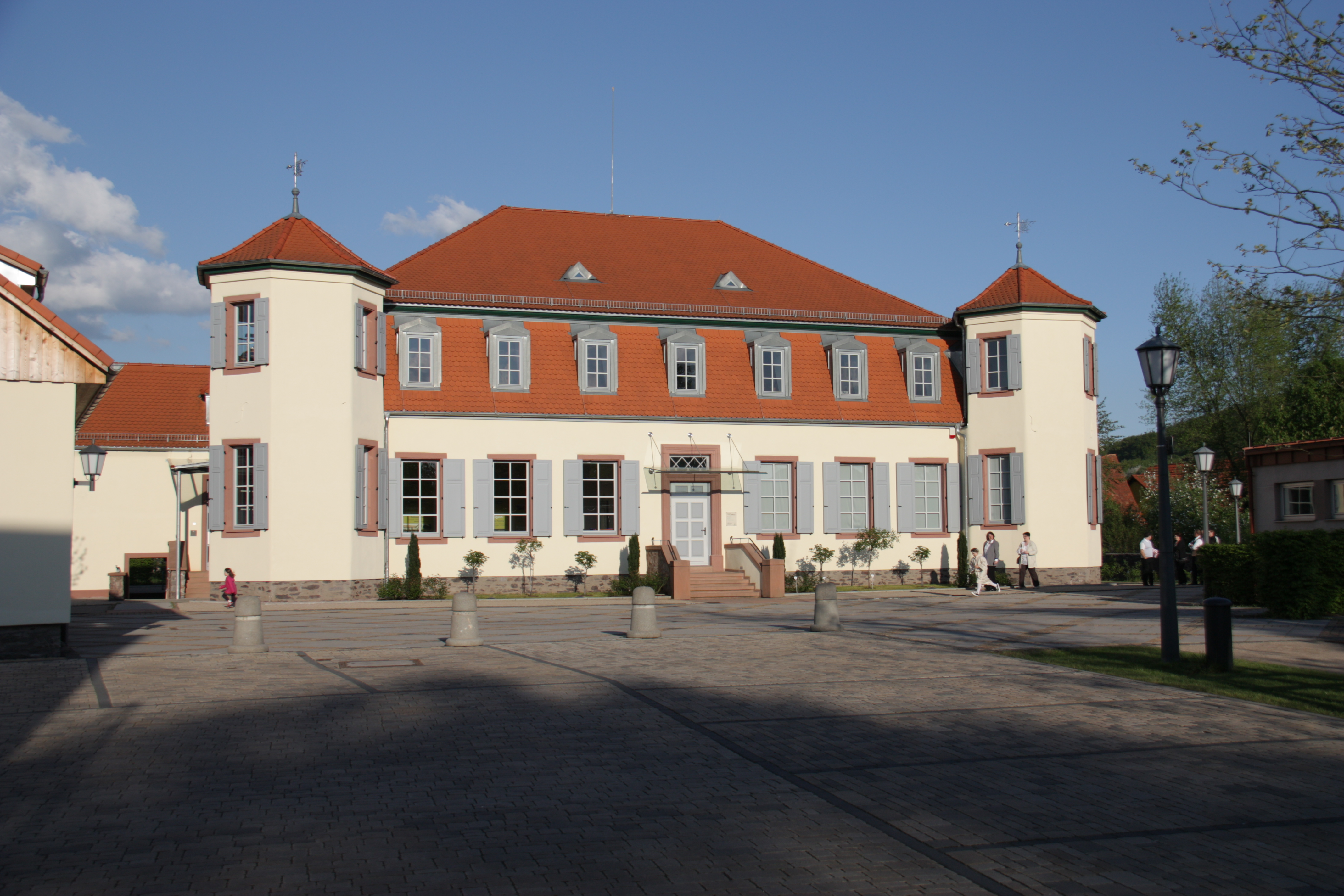 Das Schlösschen im Alzenauer Stadtteil Michelbach